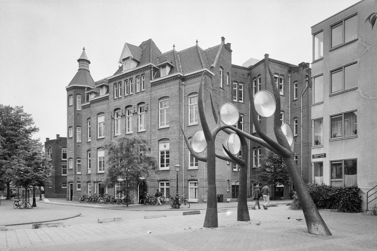 Binnengasthuisterrein: Exterieur, overzicht voorgevel tweede Chirurgische kliniek